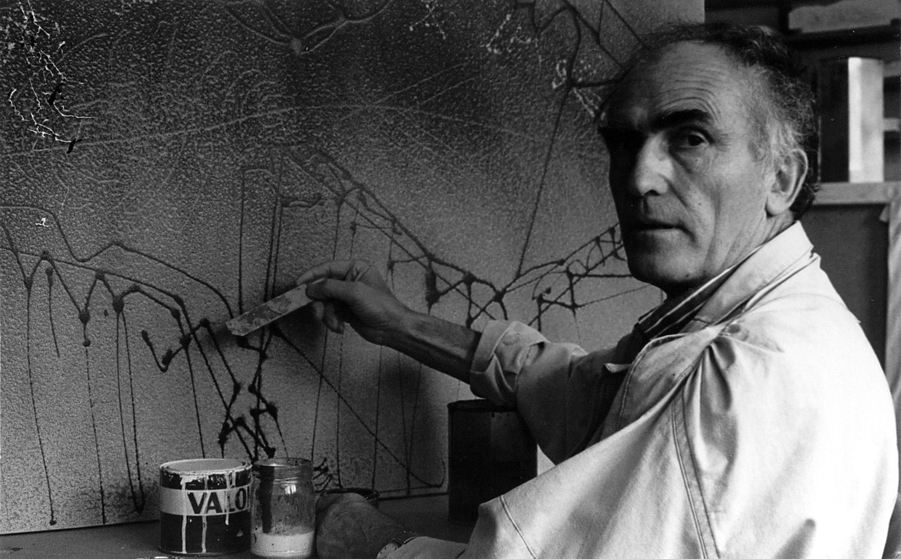 Domènec Fita treballant al seu estudi, 1991